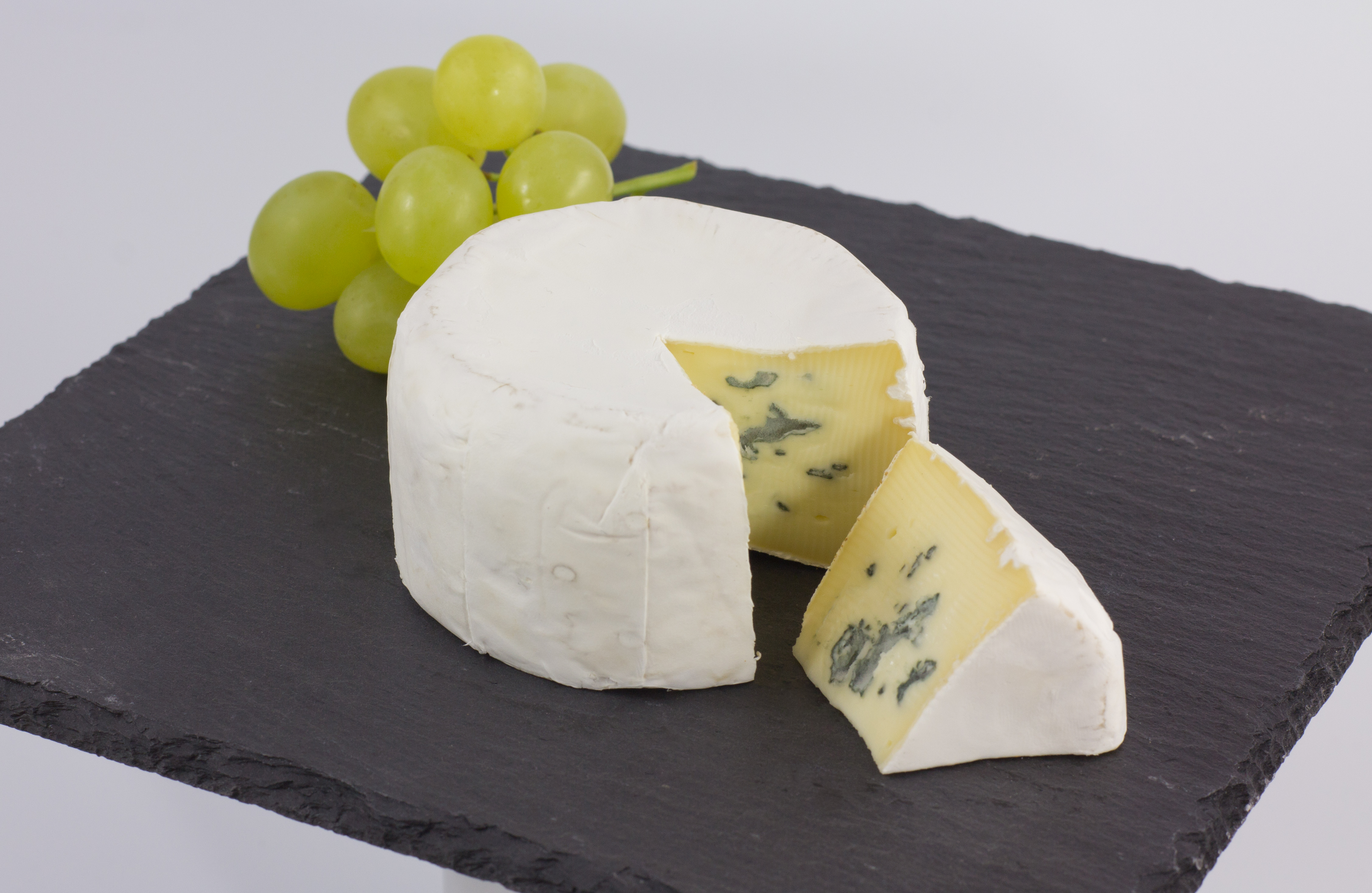 Bavaria Blue